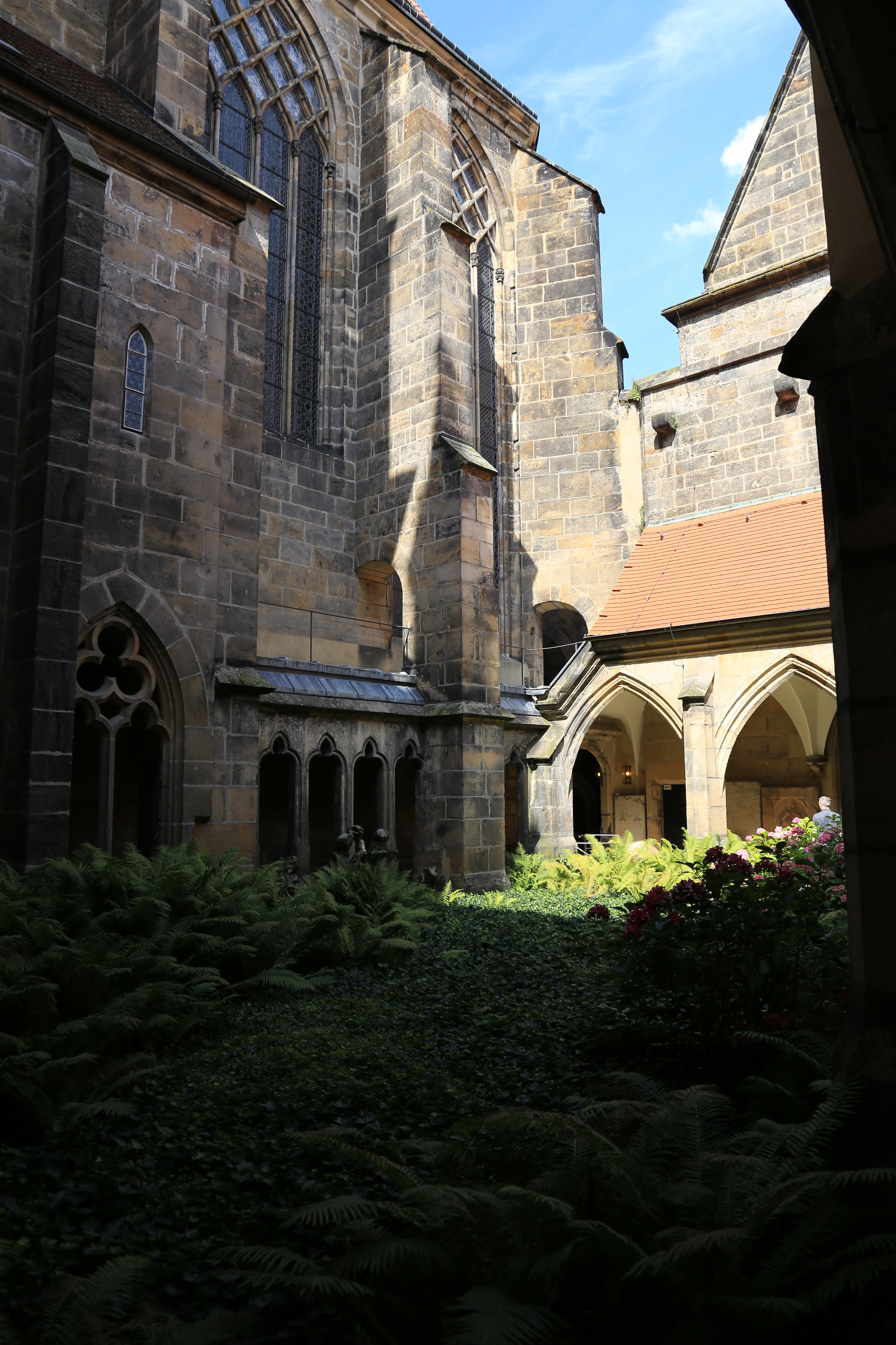 Meißen Dom Innenansichten August 2017 (1)